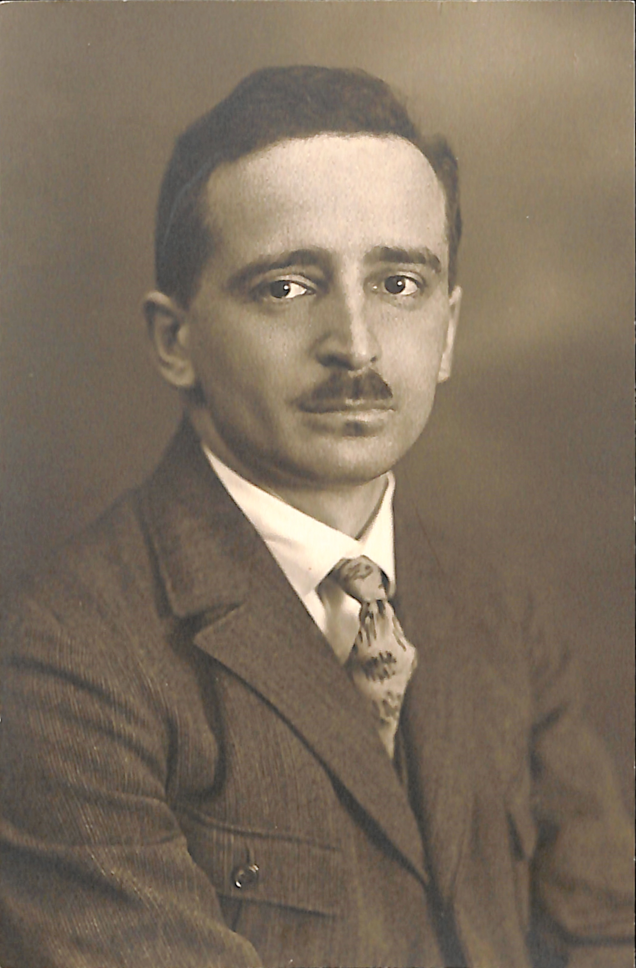 Portrait Georg Benjamin 1926